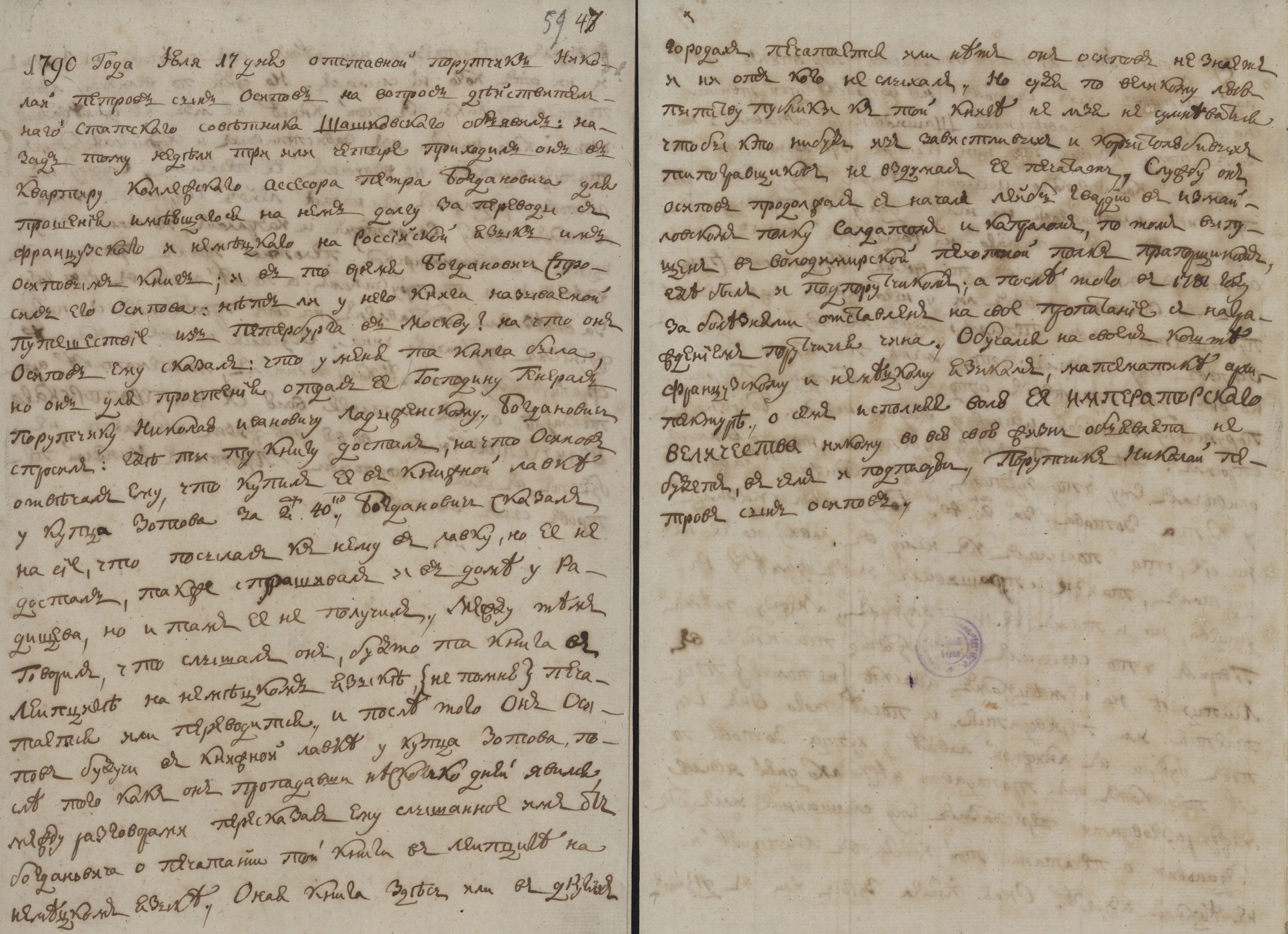 Показания Николая Петровича Осипова автограф 1790 год